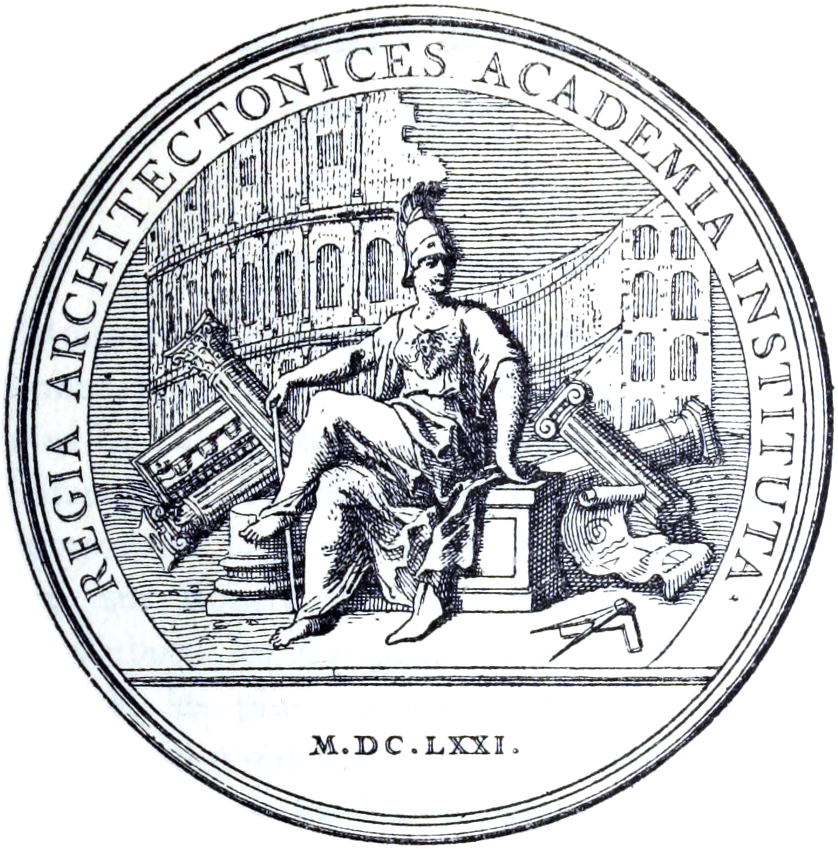 Médaille commémorative de la fondation de l'Académie royale d'architecture